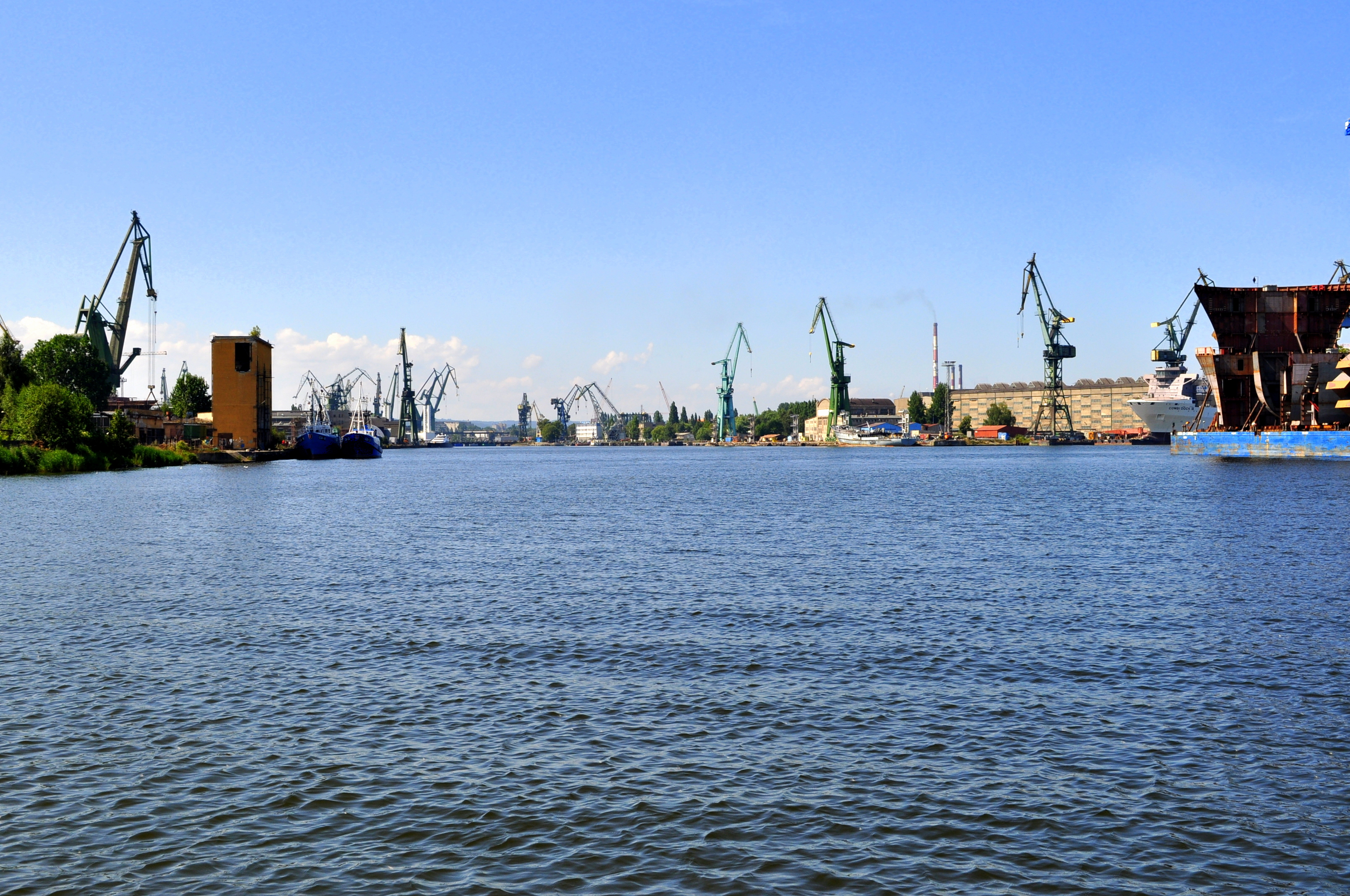 Gdańsk, Martwa Wisła.